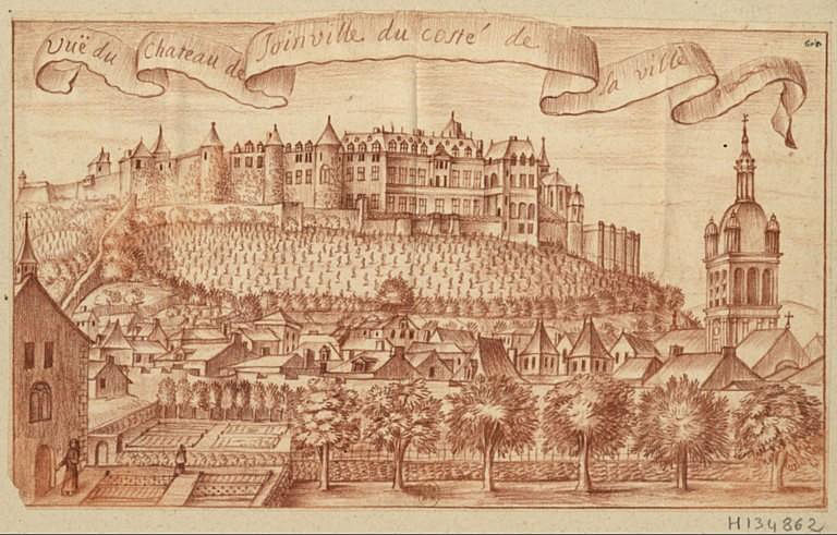 Vuë du chateau de Joinville du costé de la ville : dessin à la sanguine